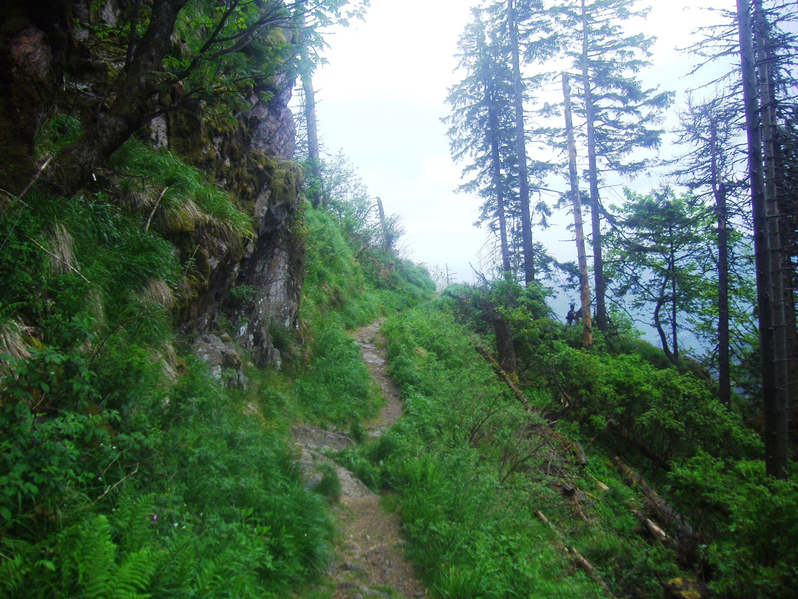 ein kleines Stück des Westwegs Pforzheim - Basel des Schwarzwaldvereins im Bereich des Hohe Kelch (1264 m), ein westlicher Ausläufer des Belchenmassivs (1414 m) im Südschwarzwald